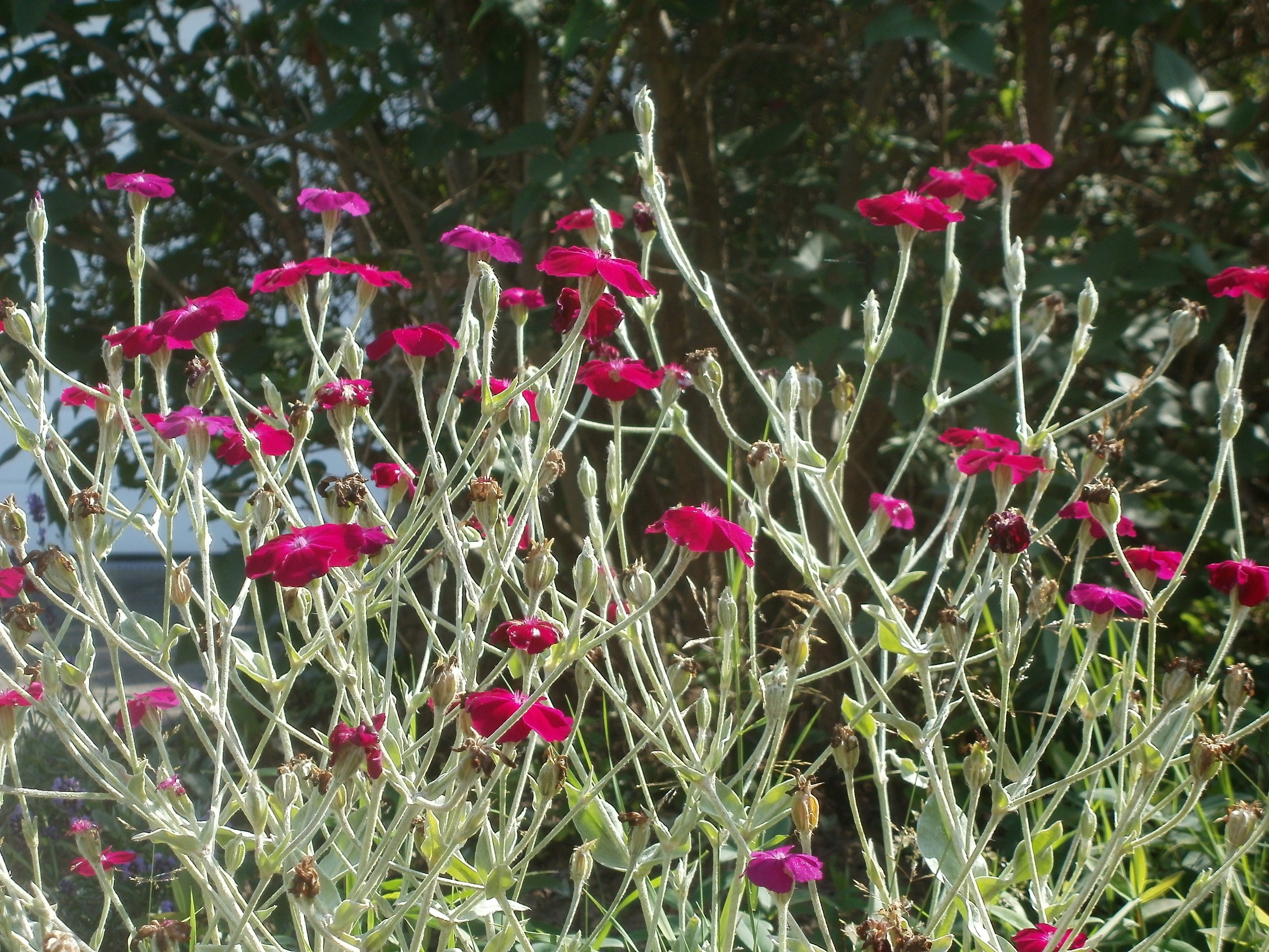 Kronen-Lichtnelke am Kohlweg (Saarbrücken)